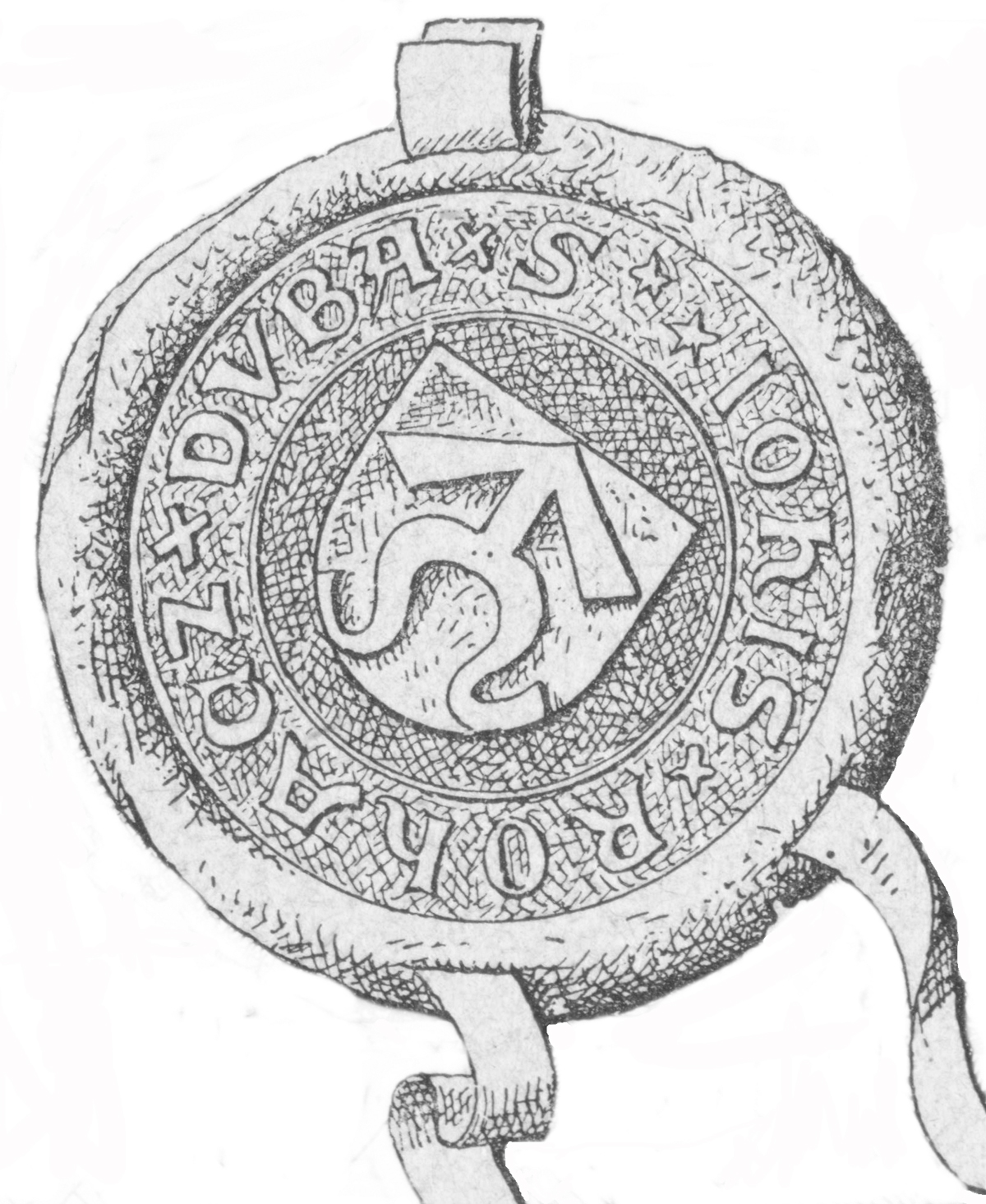 Reprodukce pečeti Jana Roháče z Dubé, která byla připojena k listu z roku 1421, jímž Roháč vyhlašuje nepřátelství Oldřichovi z Rožmberka.